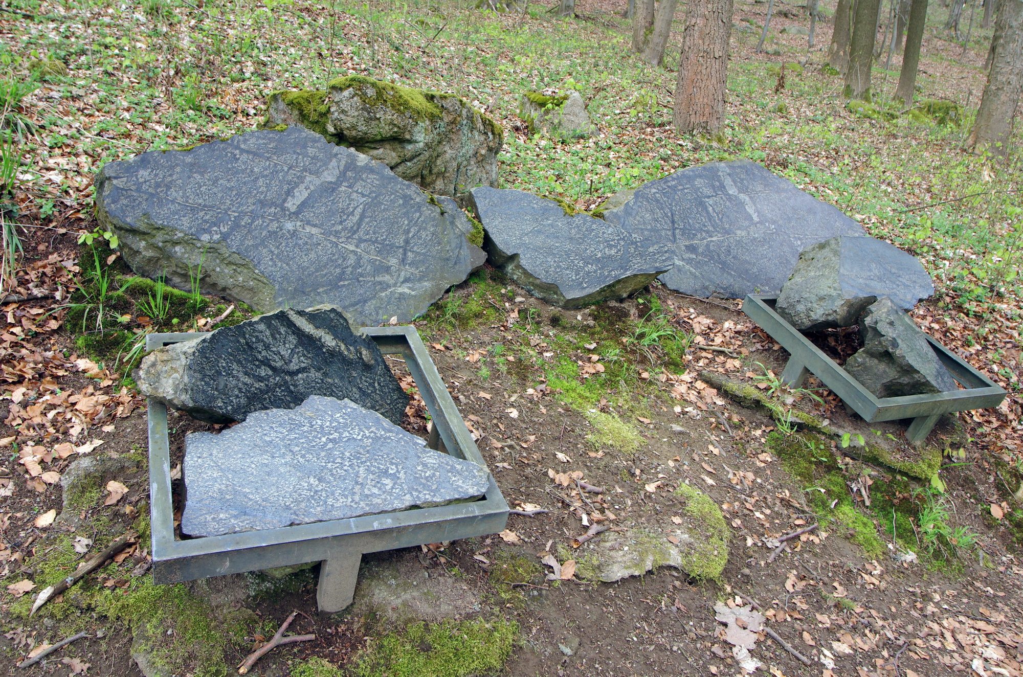 Mariánské Lázně Geopark zastanení č. 20 - hadec